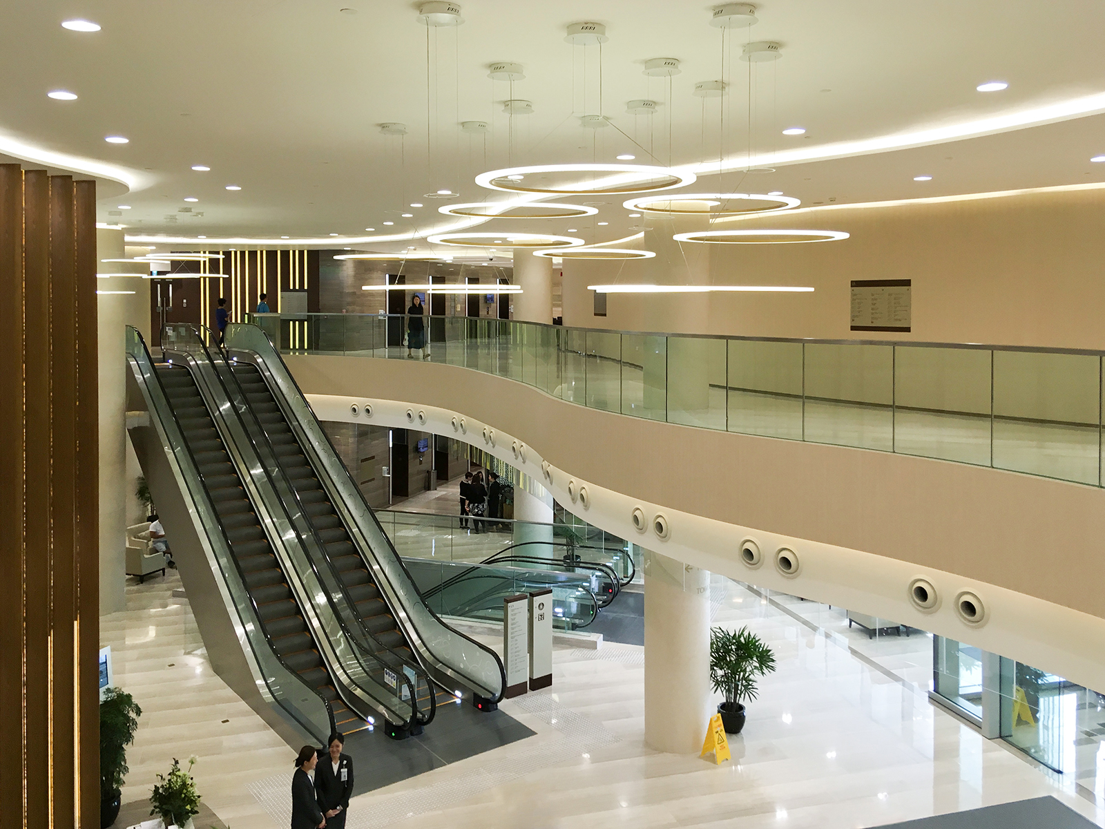 Gleneagles Hong Kong Hospital Lobby